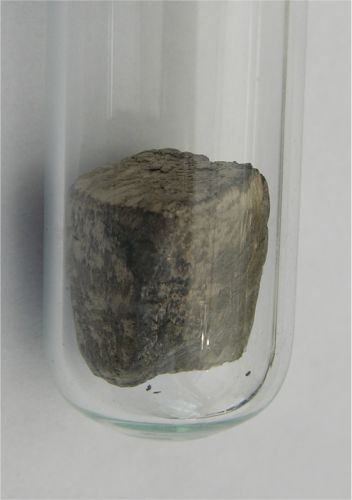 cerium Bildbeschreibung: Cer in Ampulle unter Argongas zum Schutz vor Oxidation Quelle: selbst fotografiert Fotograf/Zeichner: Tomihahndorf Datum: März 2006